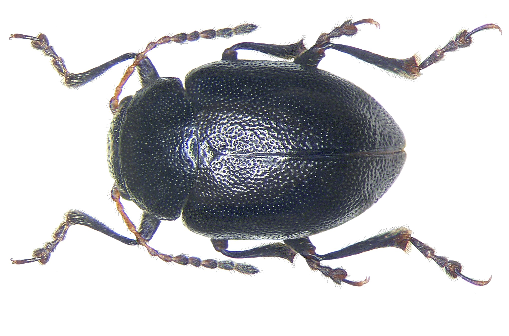 Familie: Chrysomelidae Grösse: 5,5 mm Verbreitung: mediterran Fundort: Marokko, Marrakech leg. U.Schmidt, 1995; det. Medvedjev Foto: U.Schmidt, 2007